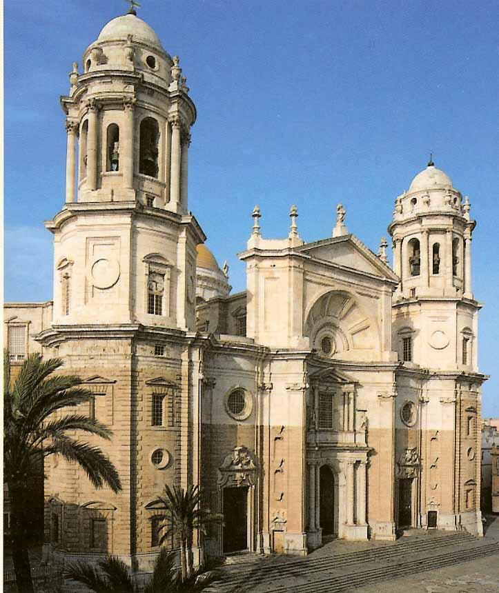 vista de la catedral de Cádiz